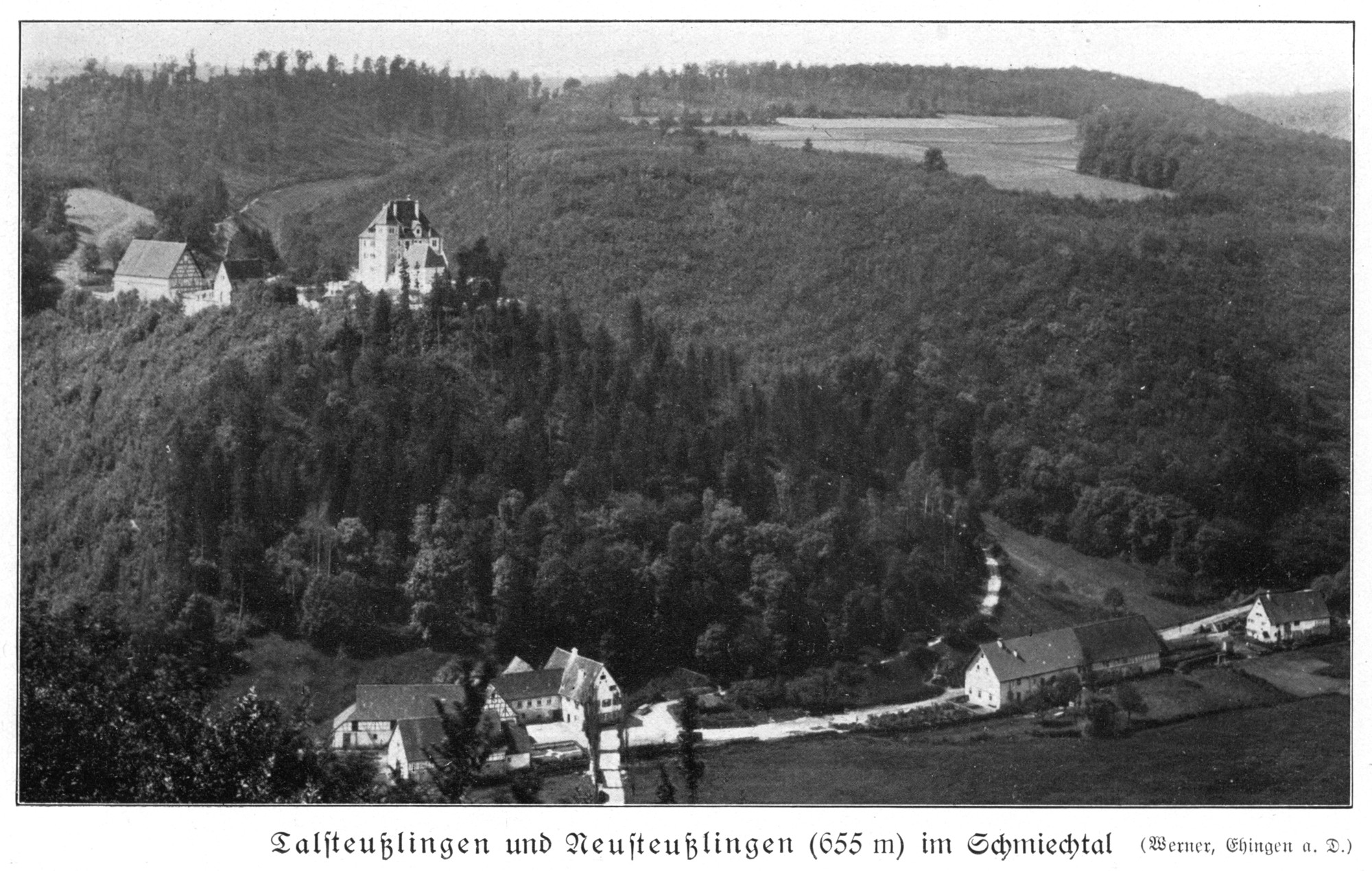 Talsteußlingen und Neusteußlingen (655 m) im Schmiechtal